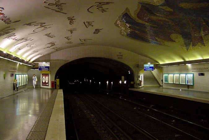 Metro Cluny Sorbonne